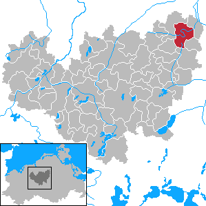 Gnoien in Mecklenburg-Vorpommern - District Güstrow